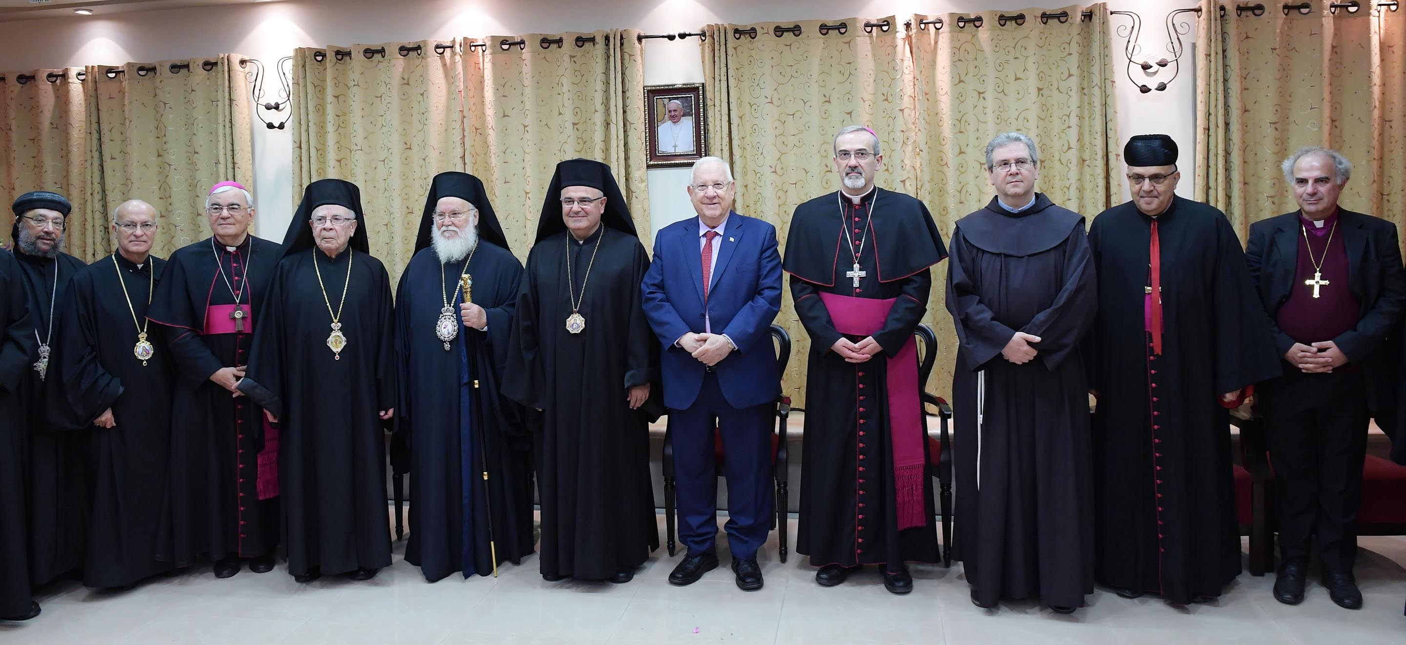 ראובן ריבלין נשיא מדינת ישראל בפגישה עם ראשי הכנסייה היוונית הקתולית בישראל.